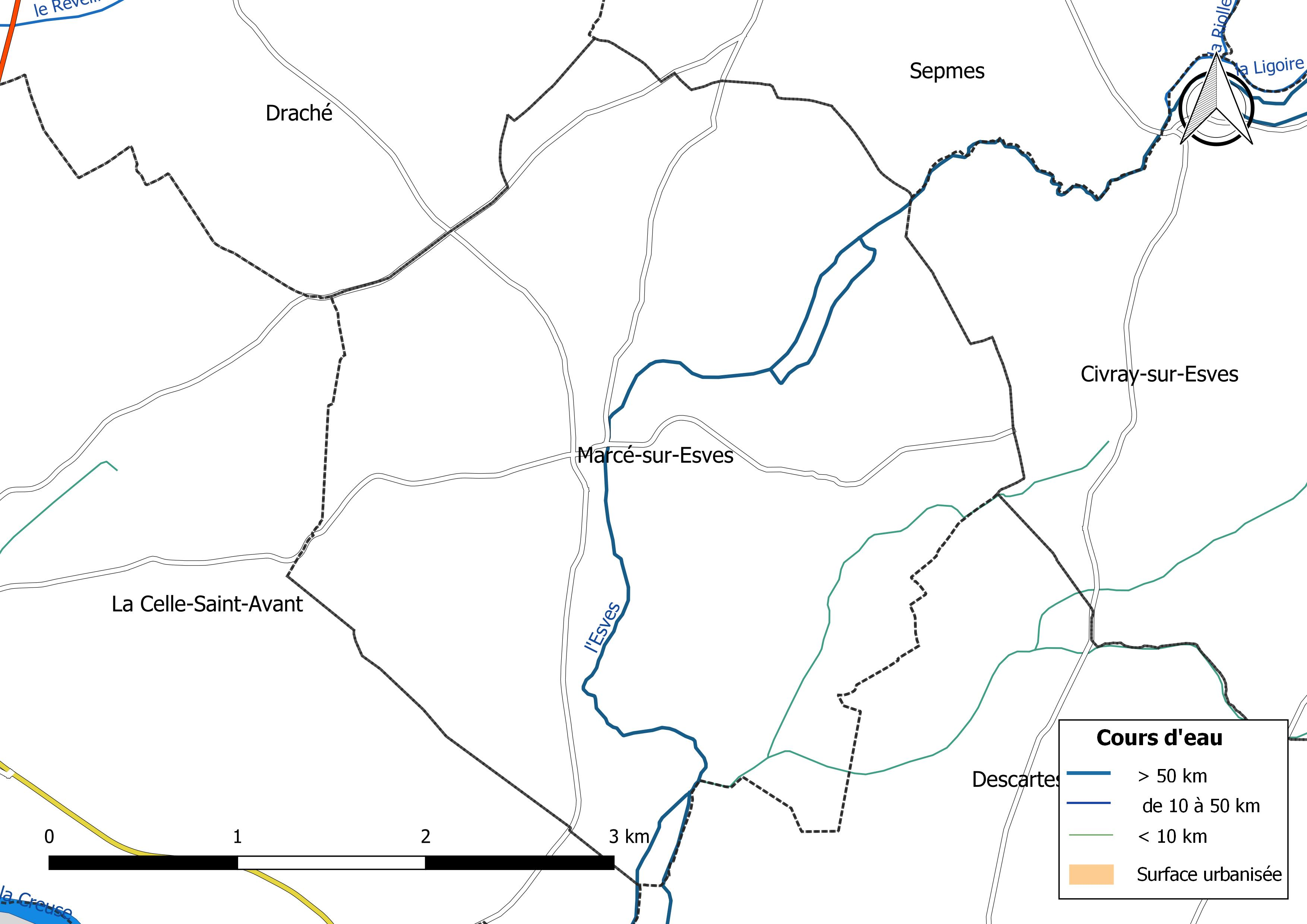 Carte du réseau hydrographique de la commune de Marcé-sur-Esves (France).